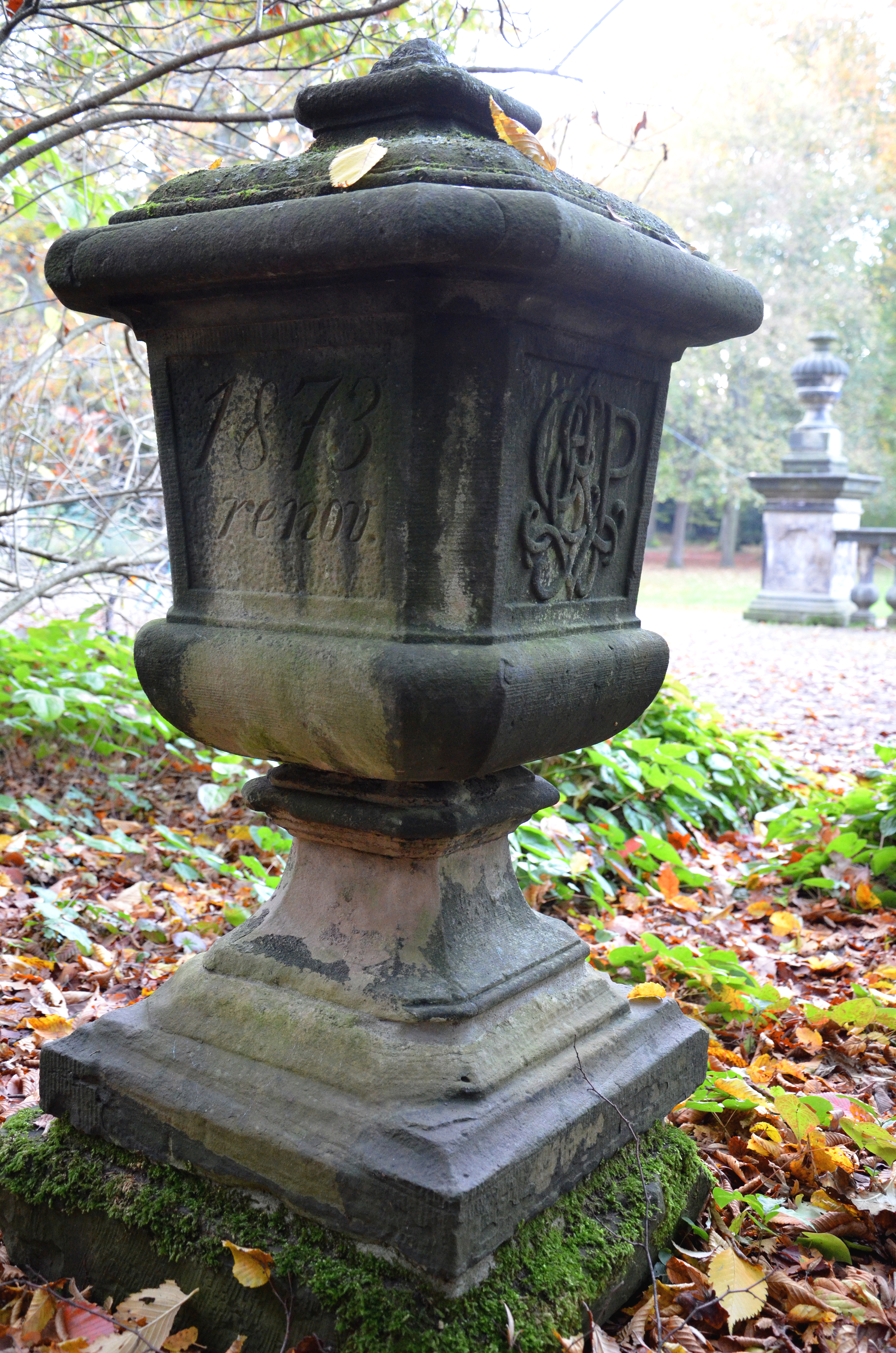 Schmuckelement im Von-Alten-Garten, hier gesehen an der Stelle des ehemaligen großen Gartensaales vom Lindener Schloss. Die aus Sandstein gehauene Skulptur trägt die Inschriften "Anno 1718" sowie die Initialen GEVP" von Graf Ernst von Platen(Hallermund) (* 3. August 1674; † 20. September 1726), dem Sohn des Schloss-Bauherren Franz-Ernst von Platen, Zum ist die Inschrift "1873 renov. eingehauen ...